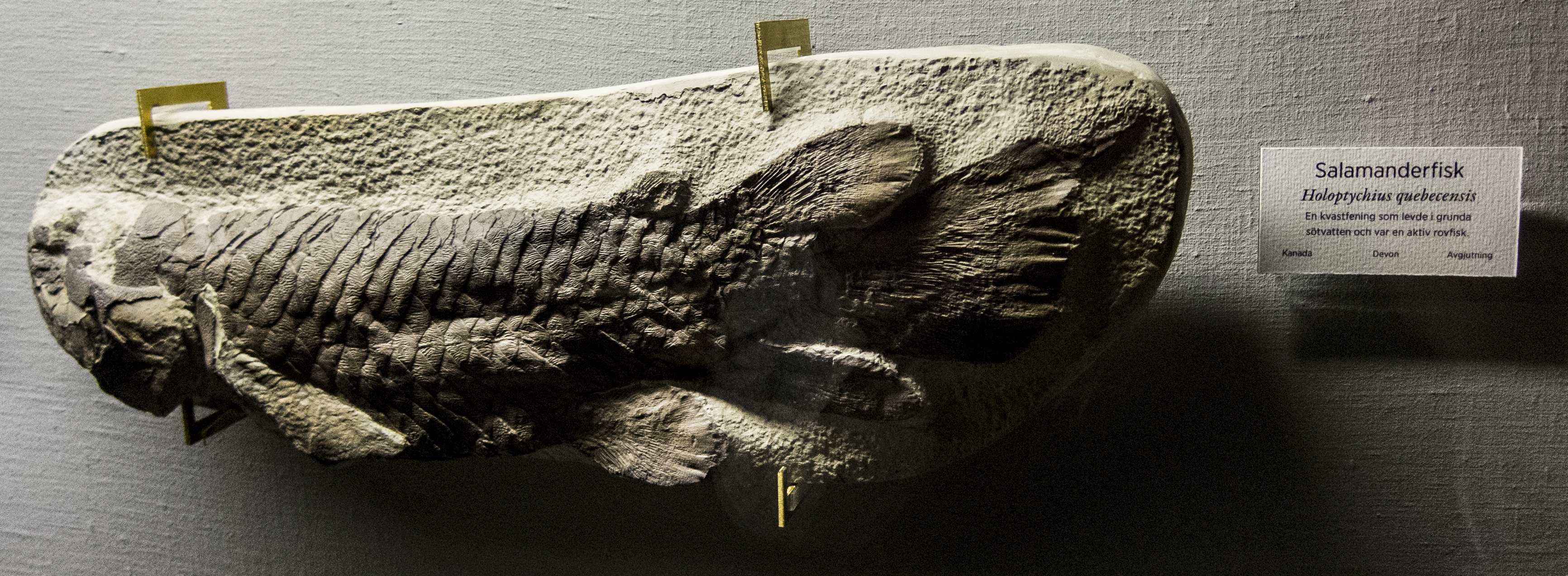 Fossil (avgjutning) av Holoptychius quebecensis, utställd på Göteborgs naturhistoriska museum. Notera etikettens titel: "Salamanderfisk".